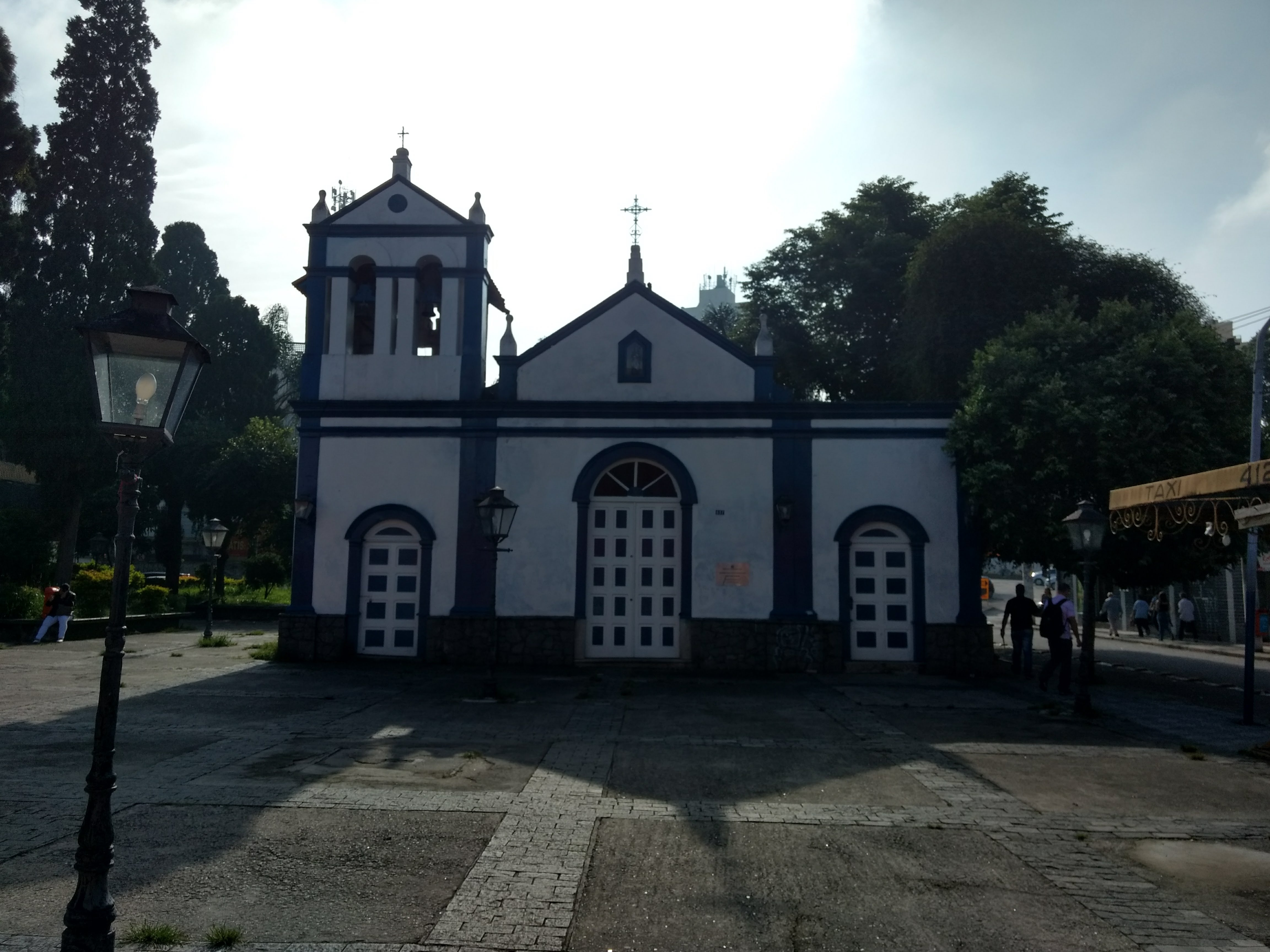 Capela de Santa Filomena na Rua Marechal Deodoro, São Bernardo do Campo - São Paulo - Brasil